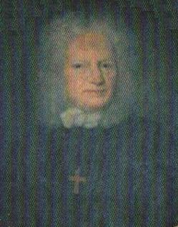 Johann Fabricius (1644-1729), Theologieprofessor in Helmstedt, Abt von Königslutter; Porträt aus seinem Epitaph im Kaiserdom Königslutter